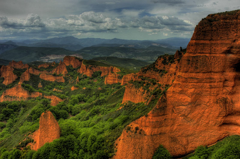 Las Médulas